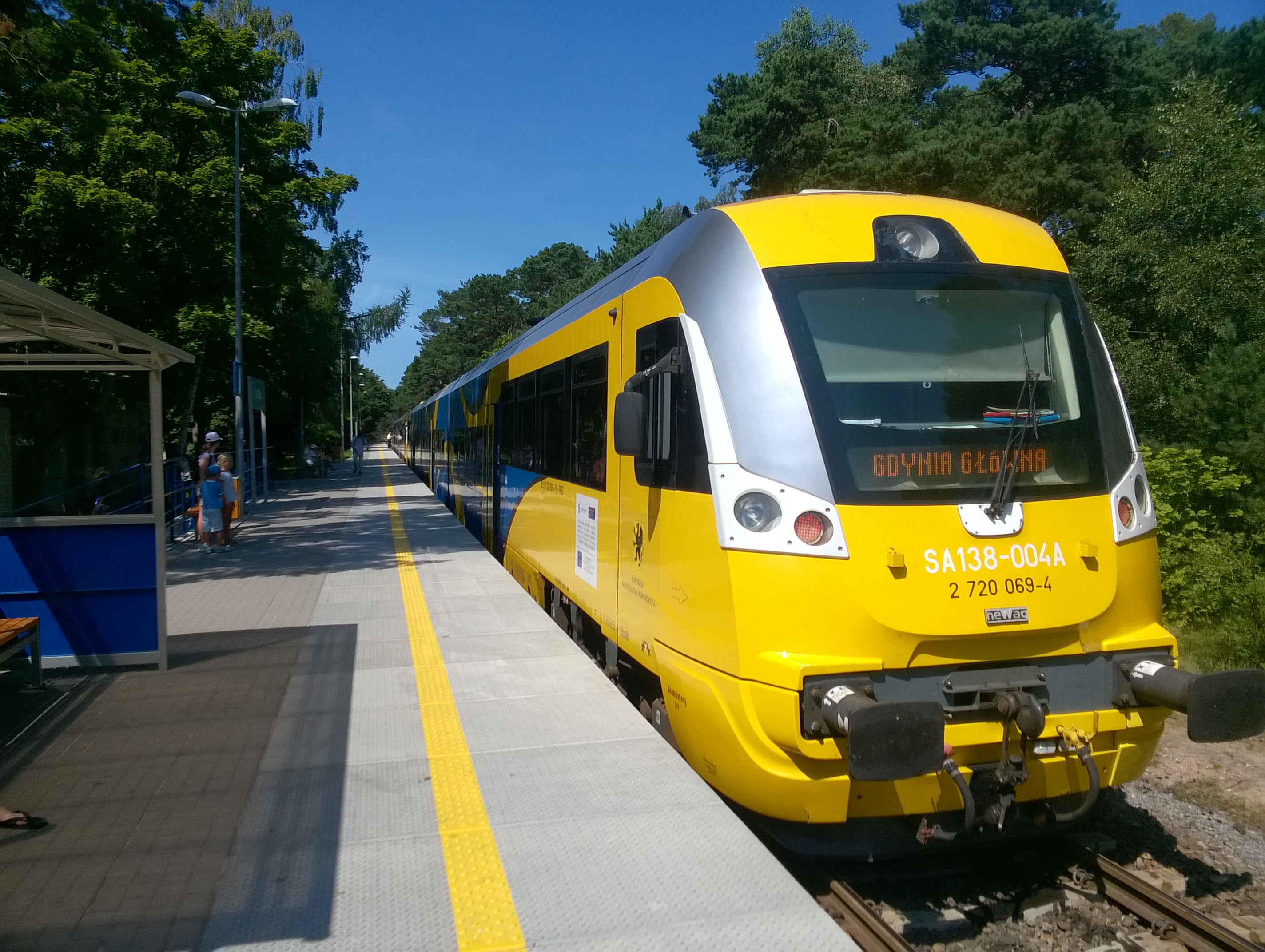 SA138-004 na przystanku kolejowym Jurata